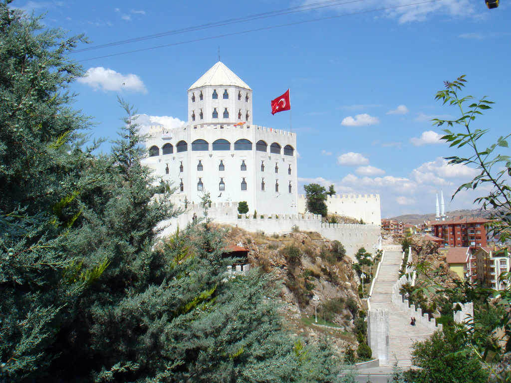 Estergon Kalesi, Keçiören